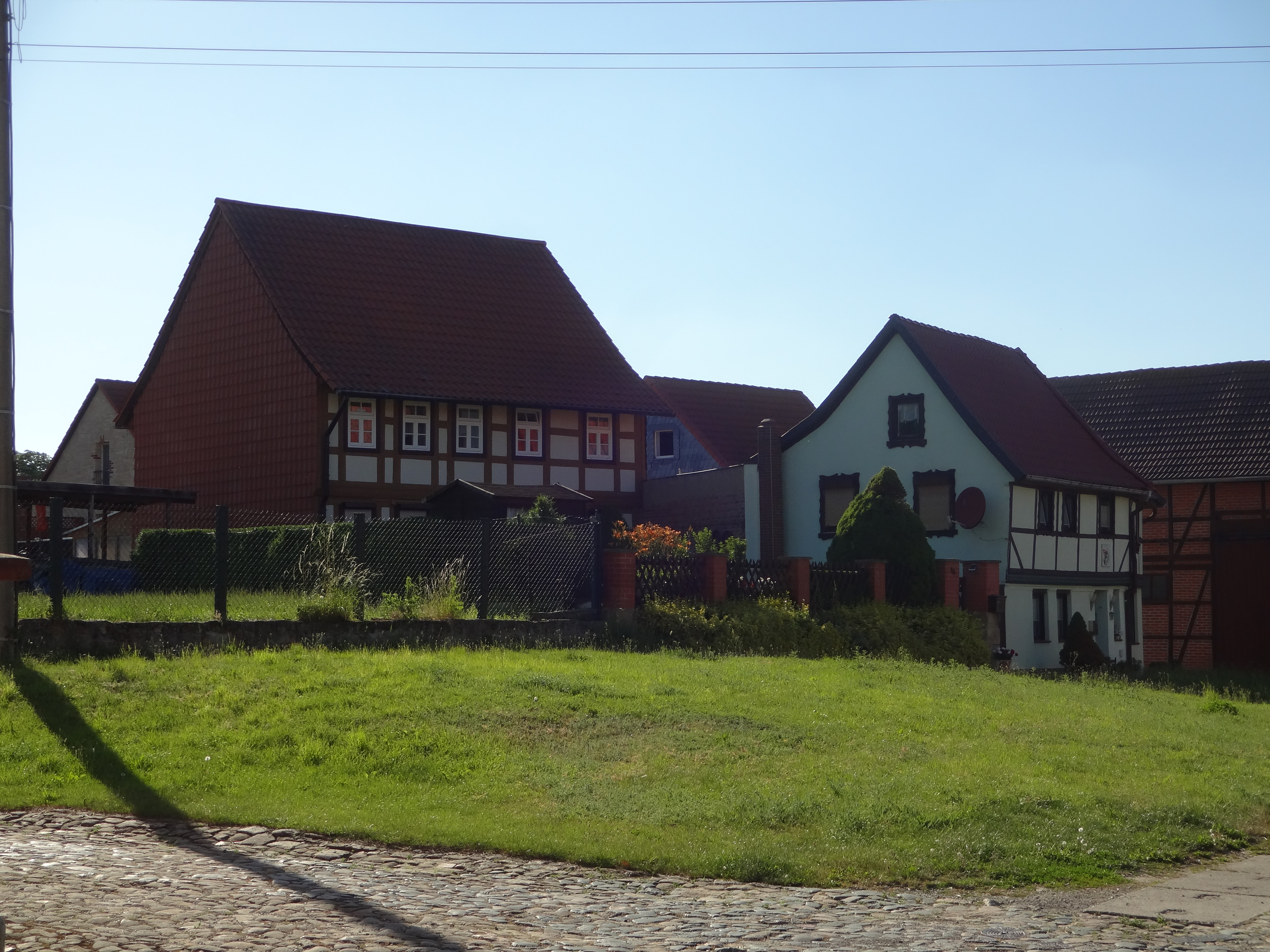 denkmalgeschütztes Bauernhaus in der Amtsstraße 16 in Harsleben